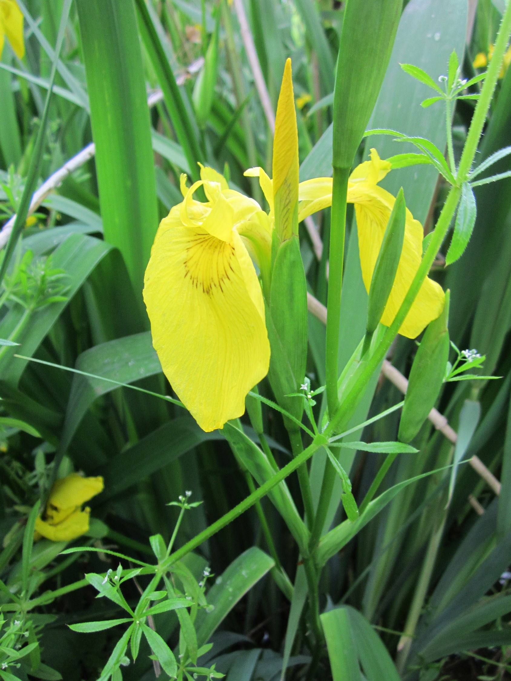 Sumpf-Schwertlilie (Iris pseudacorus) im Hockenheimer Rheinbogen